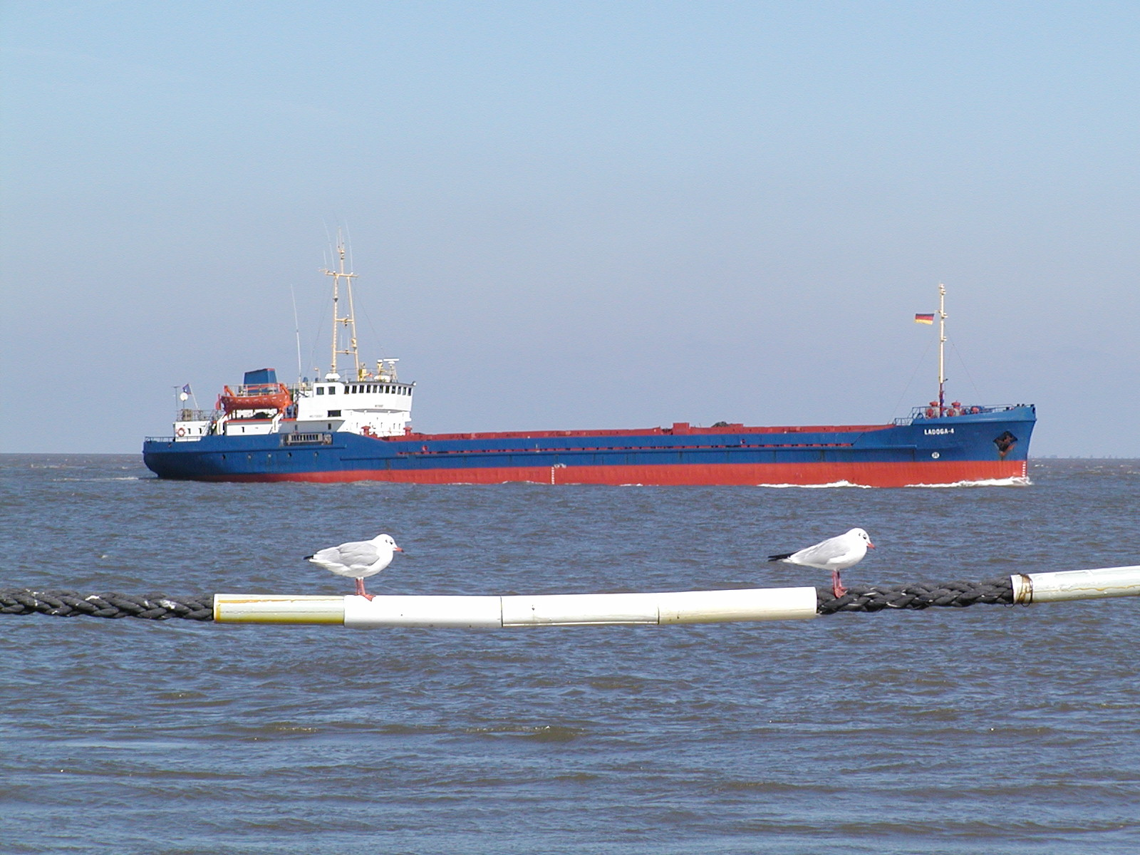 Küstenmotorschiff Ladoga-4 bei Cuxhaven IMO Number: 7311317 MMSI Number: 201100108 Callsign: ZAD101 Year Built: 1973 Length: 81 m Beam: 12 m